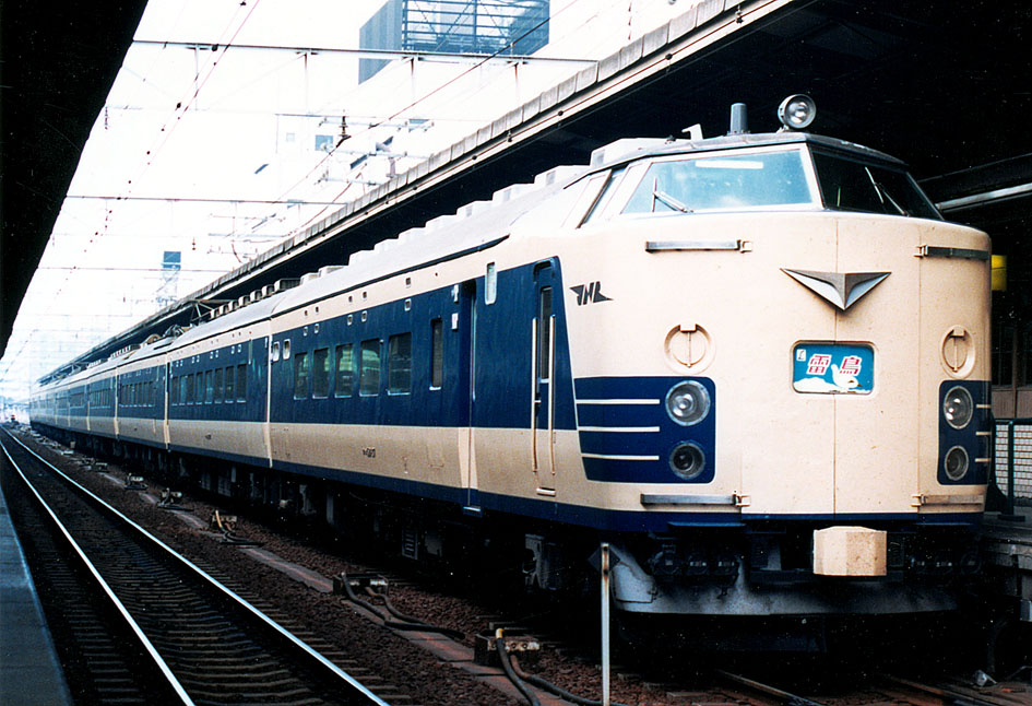 国鉄581・583系特急形電車 特急「雷鳥」